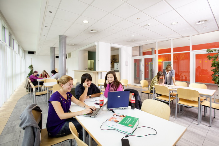 Abreitsräume im Studentenhaus